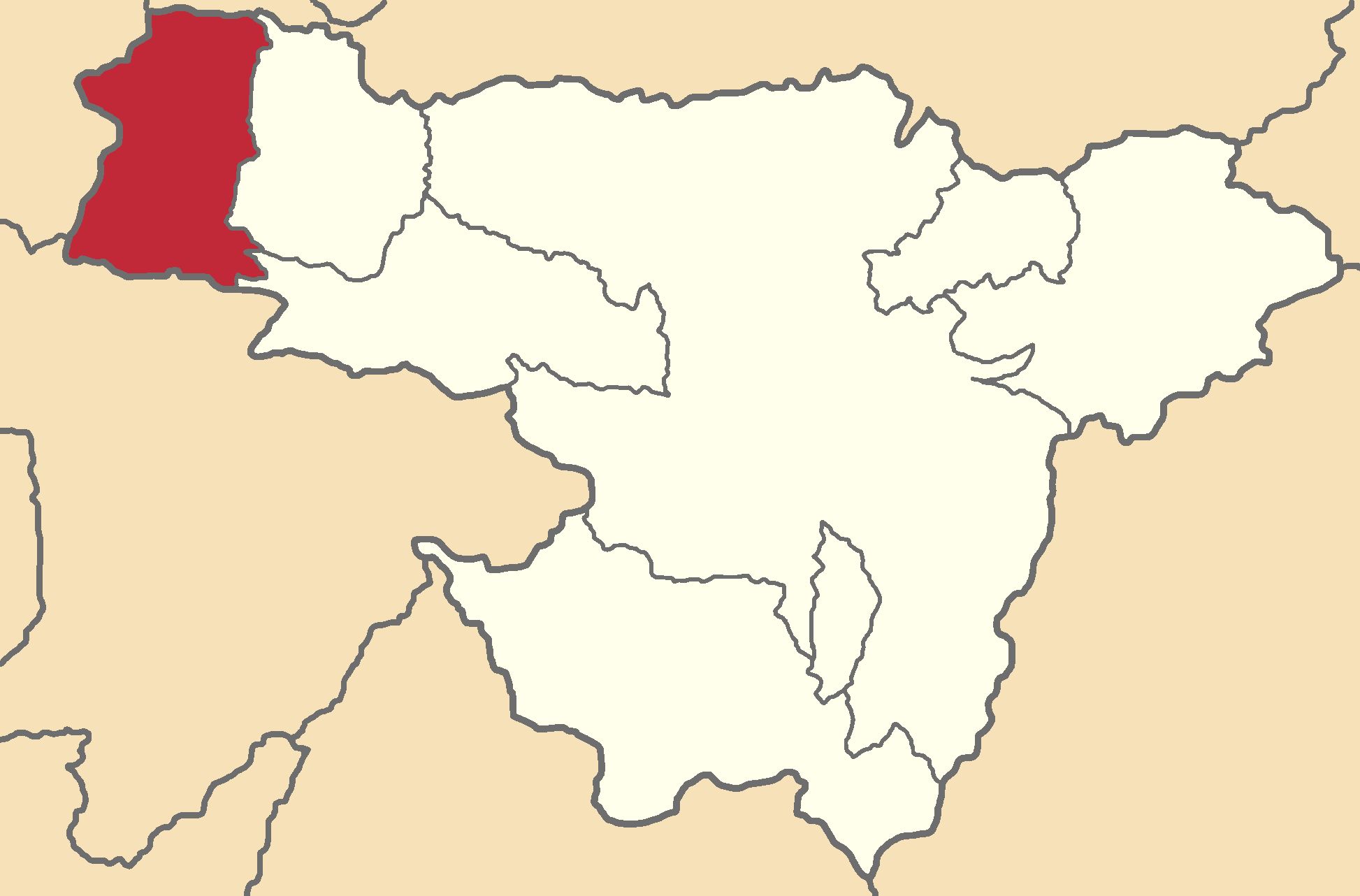 Mapa localizador del cantón en Pichincha, Ecuador